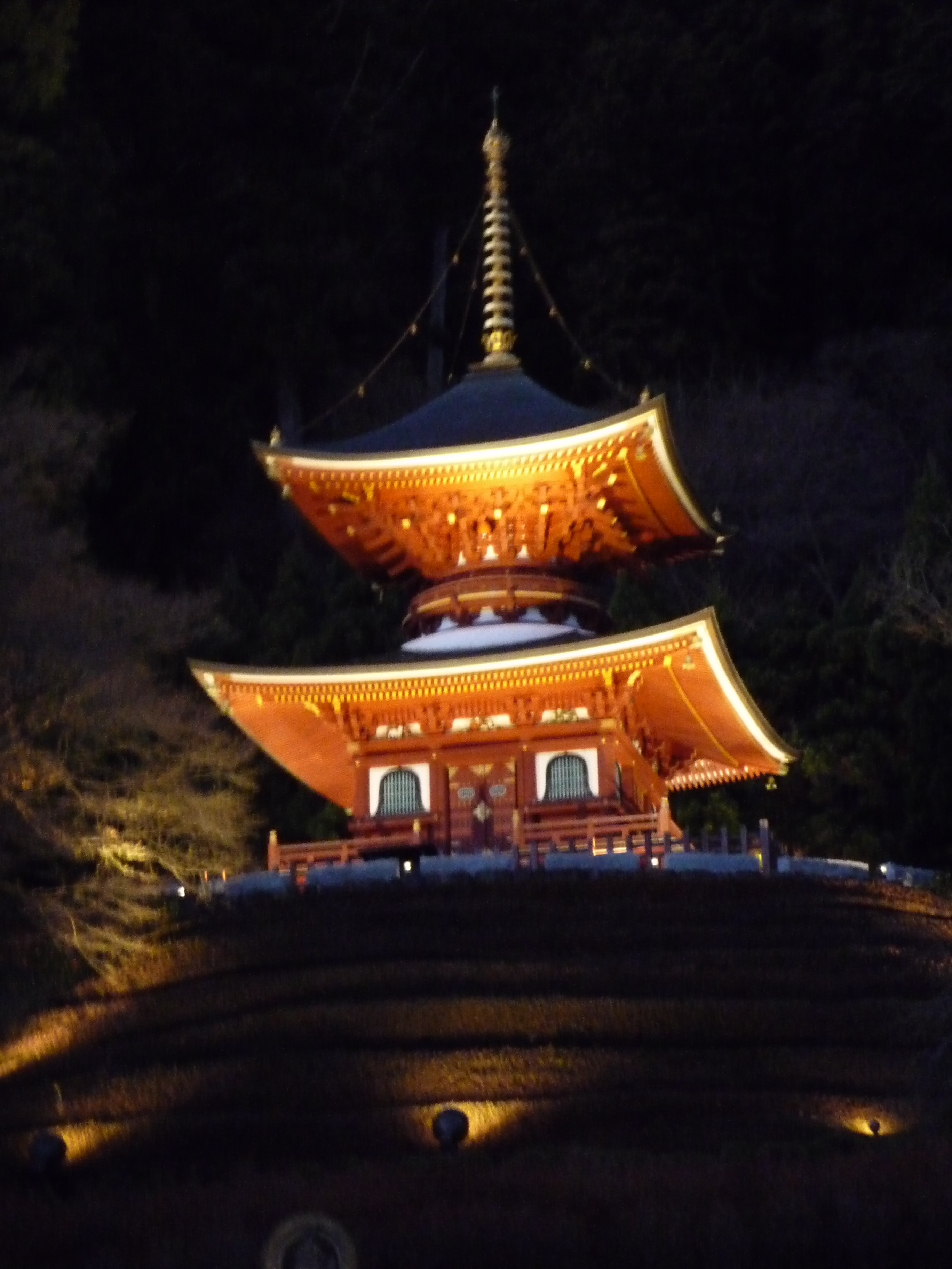 勝尾寺ライトアップ（多宝塔）